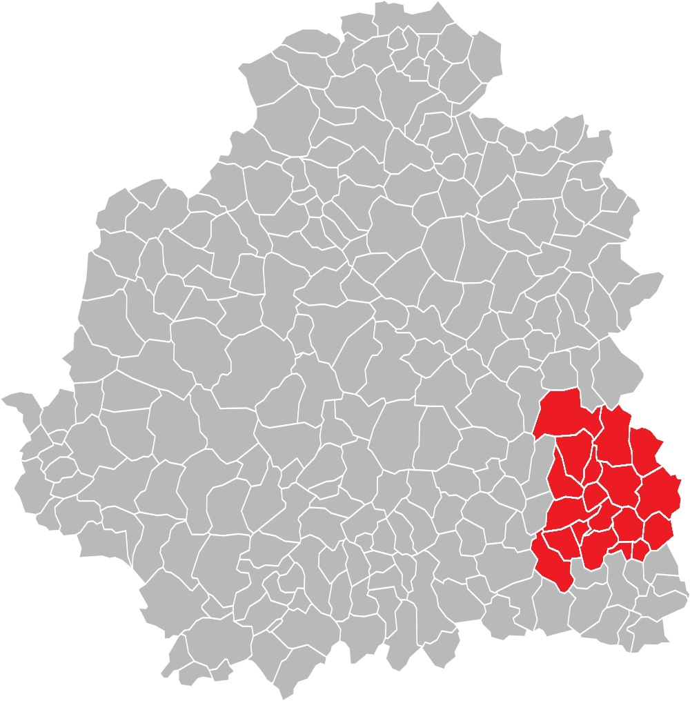 Carte des communes de l'Indre (36) : Le canton de La Châtre, de 1790 à 2015.